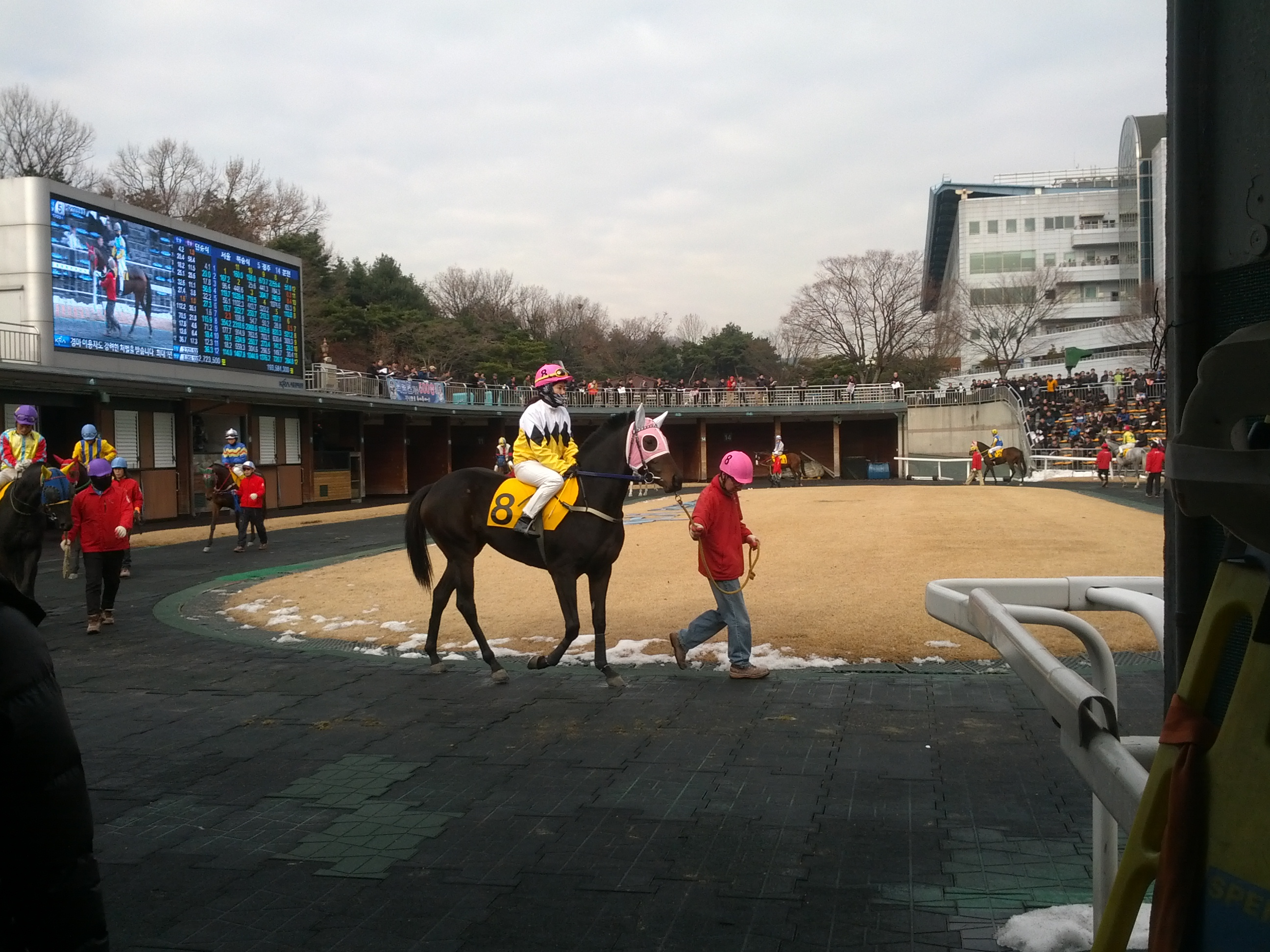 경주마 그린로드